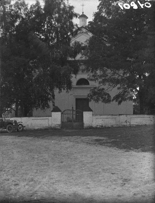 Беларуская (тарашкевіца): Безьдзеж (Bieździež). Касьцёл